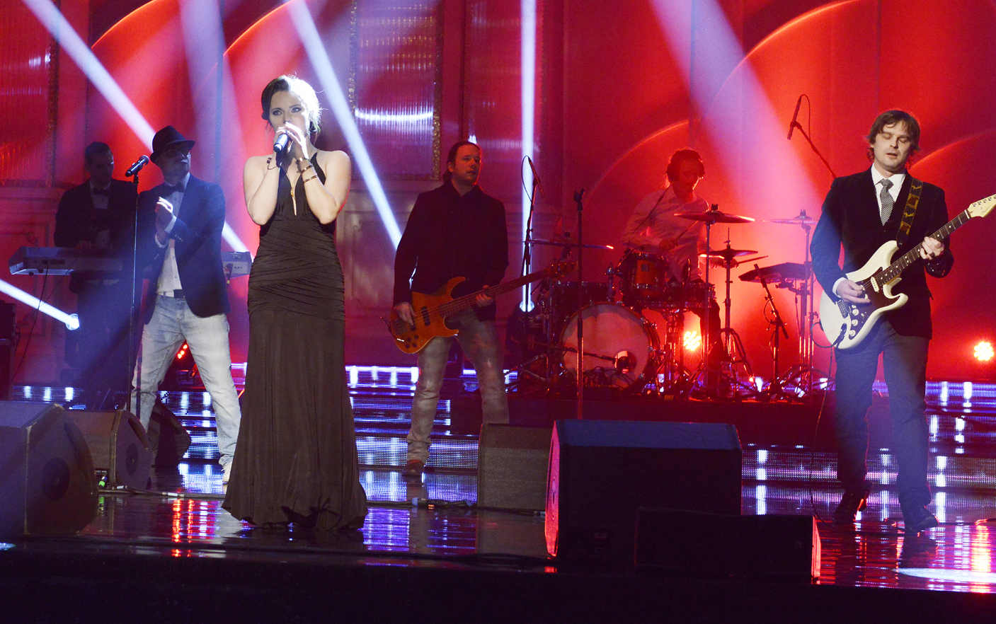 Peter Bič Project (Krištáľové krídlo 2015)